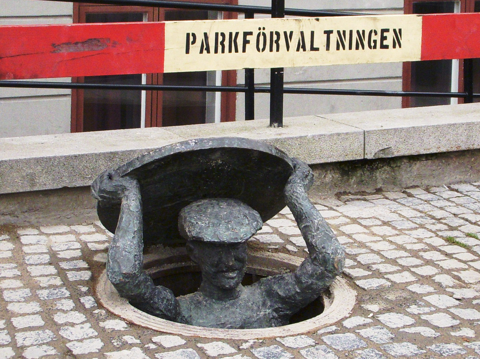 Skulptur "Humor" av Karl Göte Bejemark vid Slussen